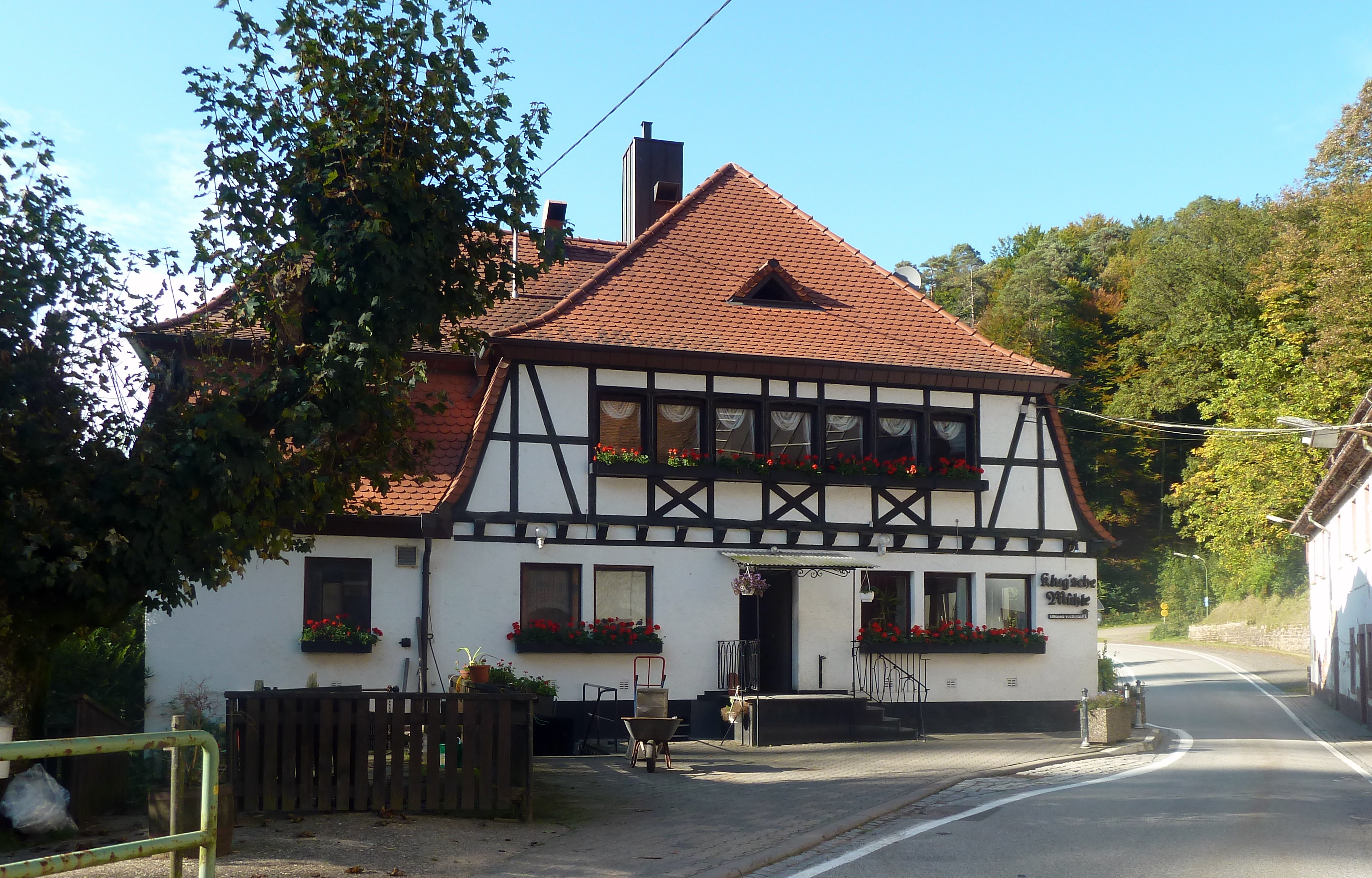 Die romantische Klug´sche Mühle im Karlstal